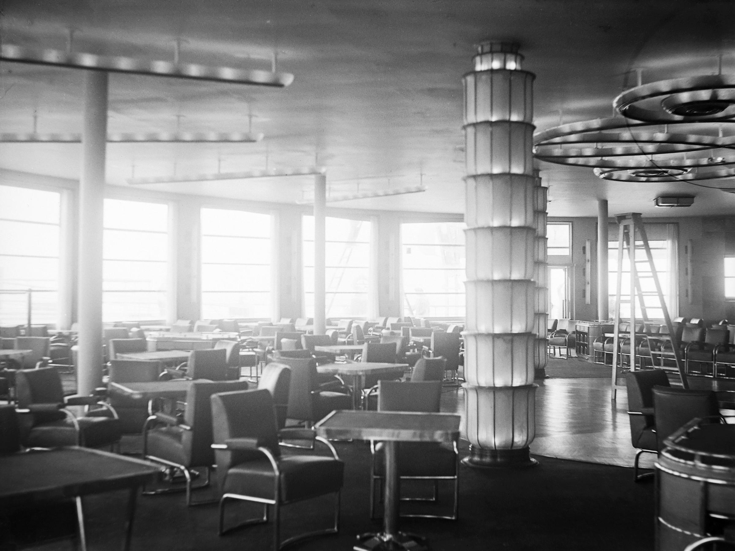 Bar-grill 1ère classe du paquebot Normandie